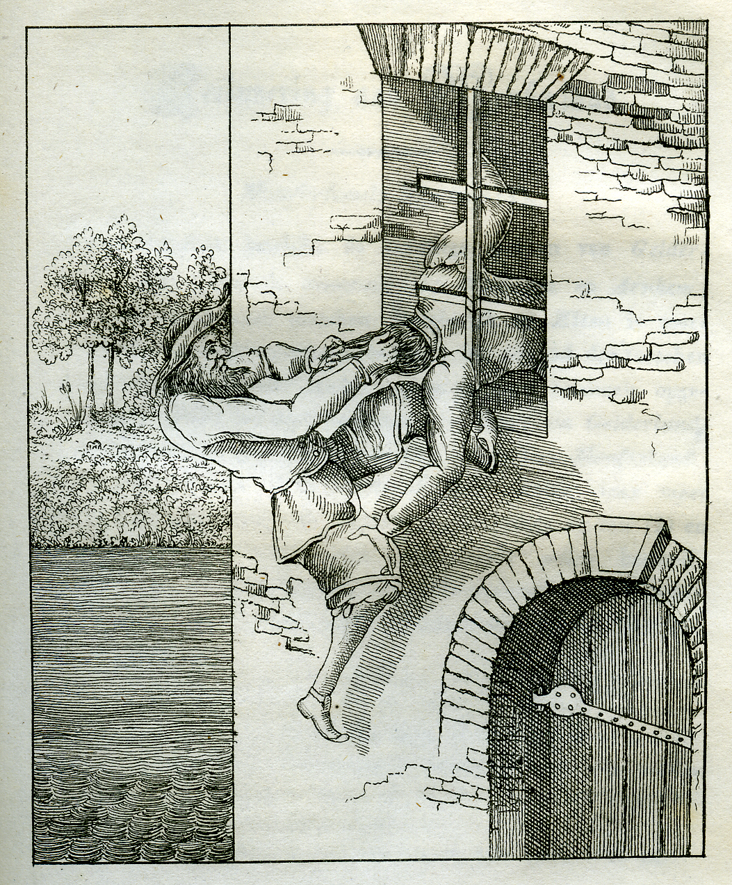 De duivel trekt Faust door het tralieraam naar buiten.